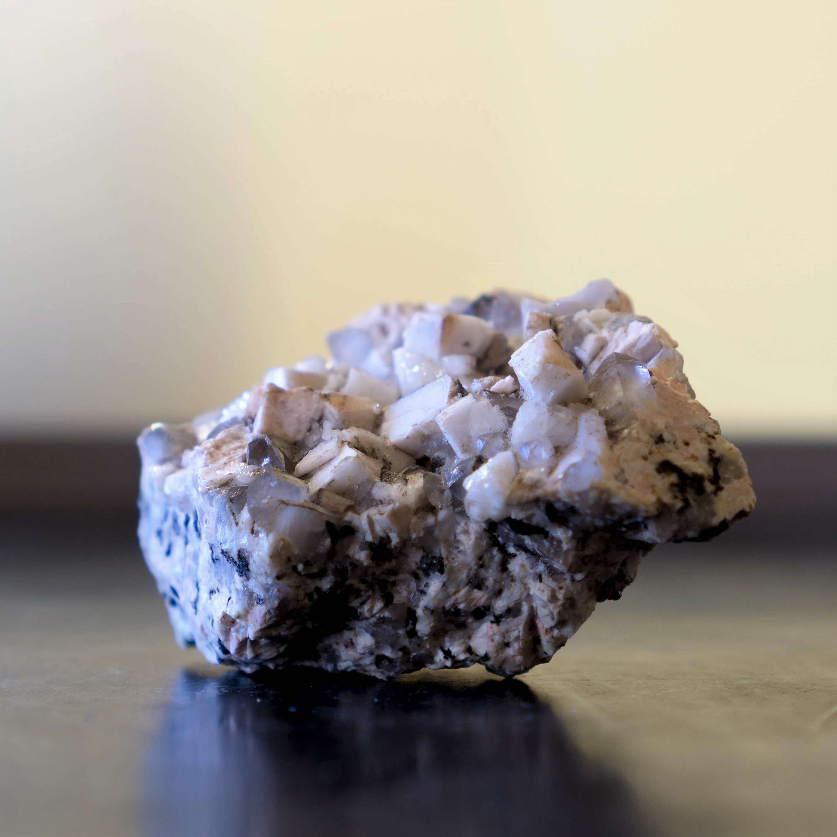 Campione di granito presente nella collezione mineralogica dell'Università degli studi di Padova